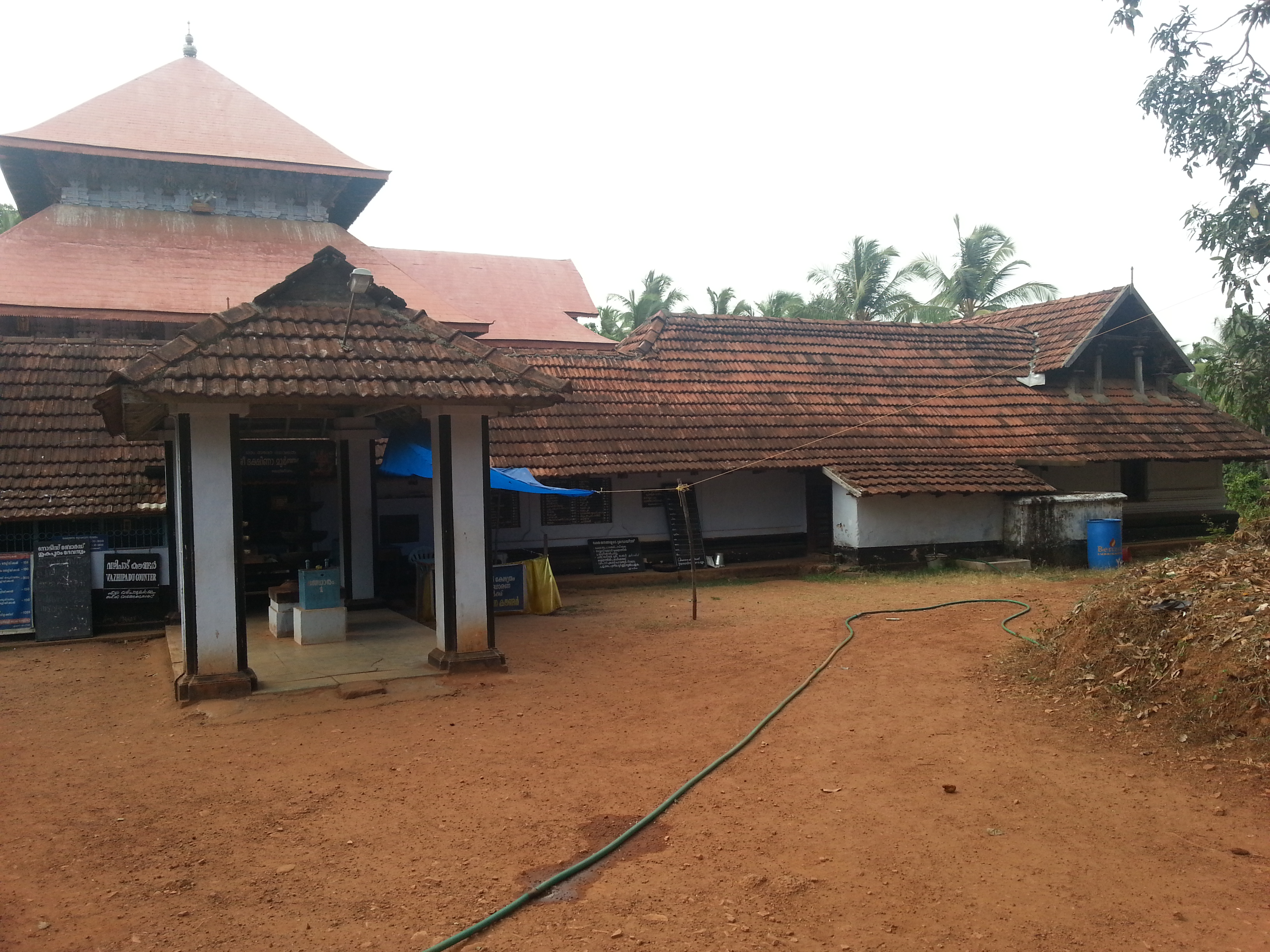 sukapuram dakshinamoorthy temple near edappal, malapuram district keralam india